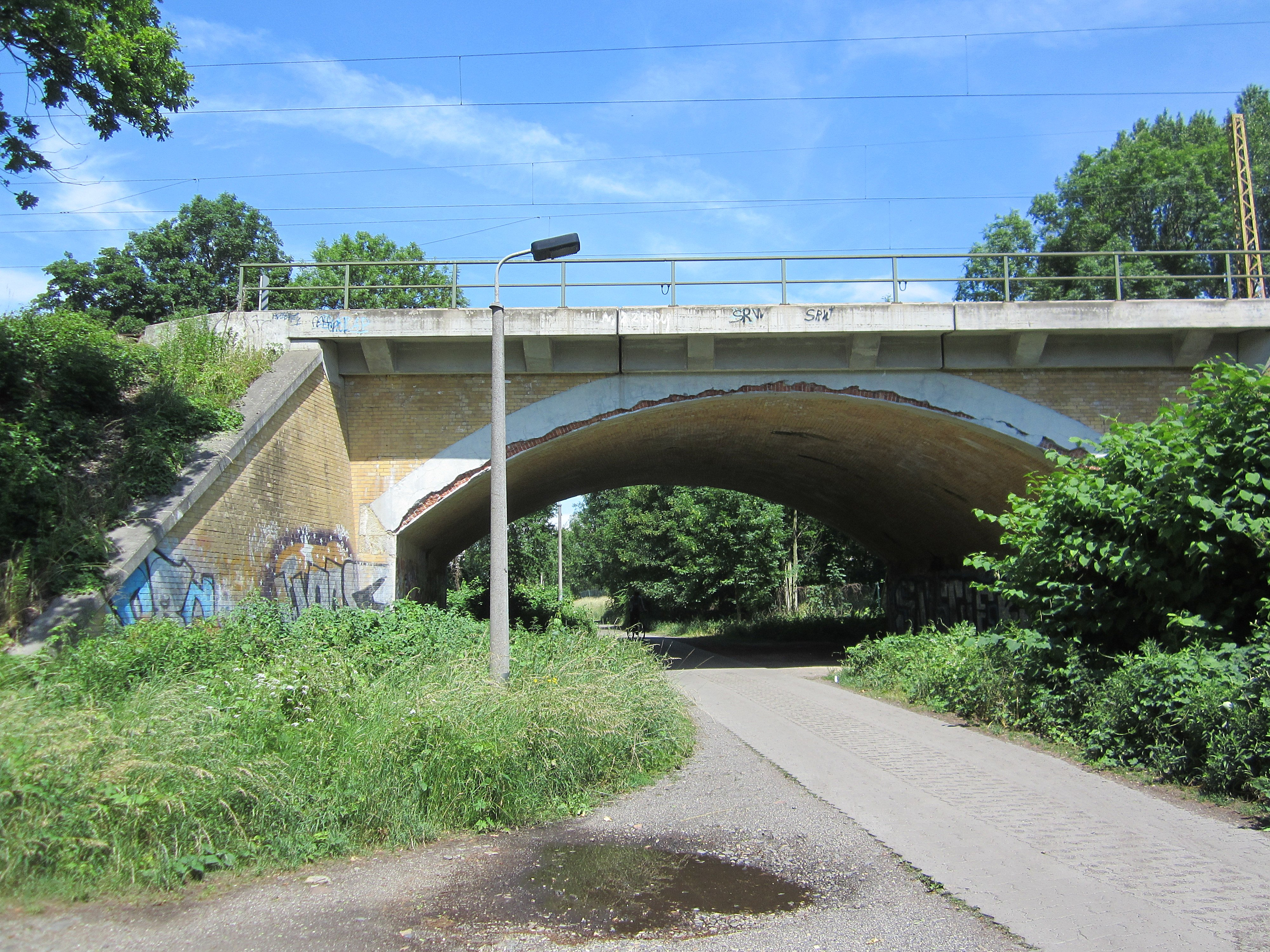 Eisenbahnbrücke An der Parthe in Leipzig-Mockau; Denkmalbeschreibung: Eisenbahnbrücke (gelbe Klinkertonne; Sandsteinquader; Strecke 6360 Leipzig Hbf.–Eilenburg; Streckenkilometer 3.844)